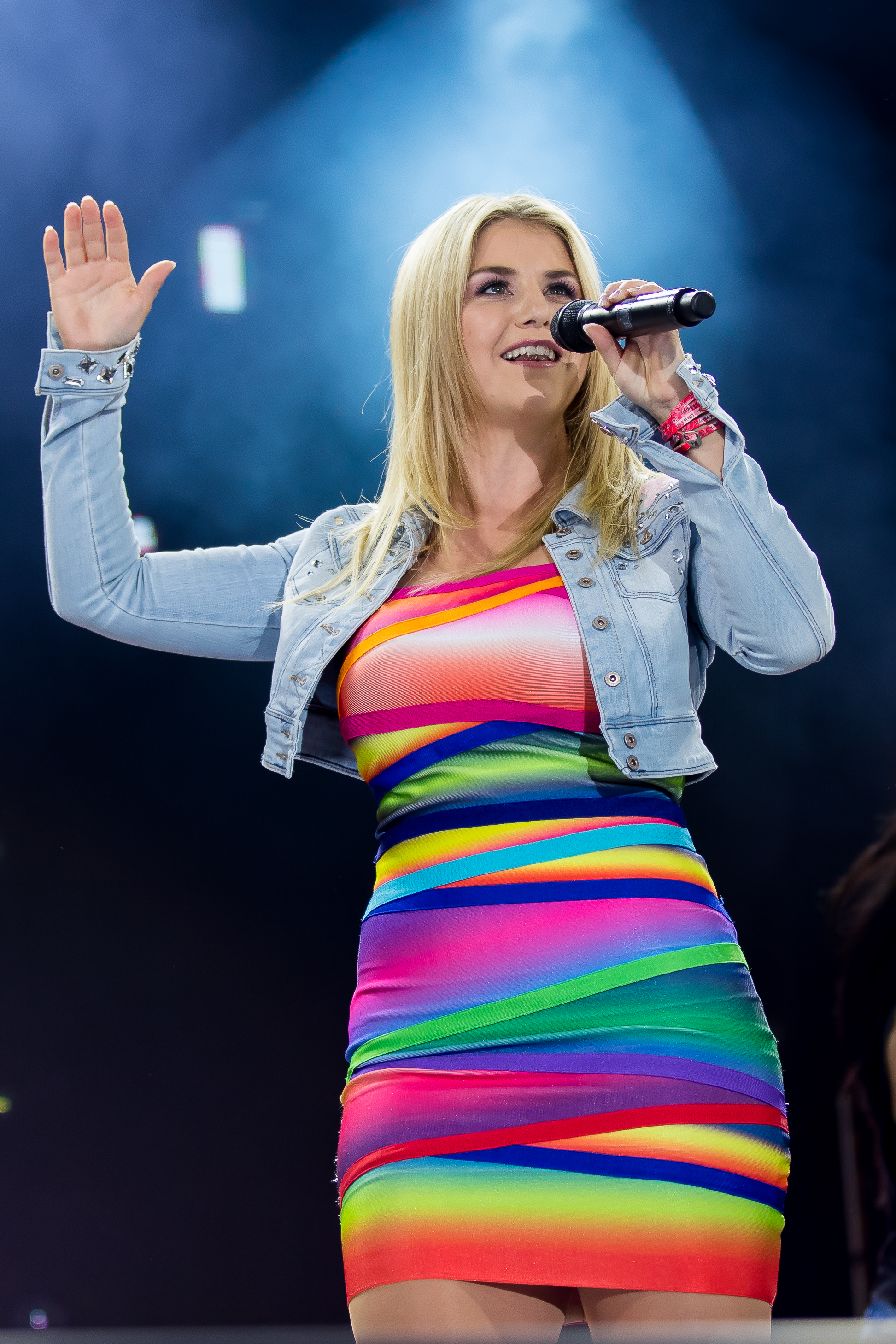 Beatrice Egli during SWR4 Schlagernacht mit Jürgen Drews, Beatrice Egli, Vanessa Mai, Nik P. und Mitch Keller at Technik Museum Speyer, Speyer, Rheinland Pfalz, Germany on 2016-07-24, Photo: Sven Mandel